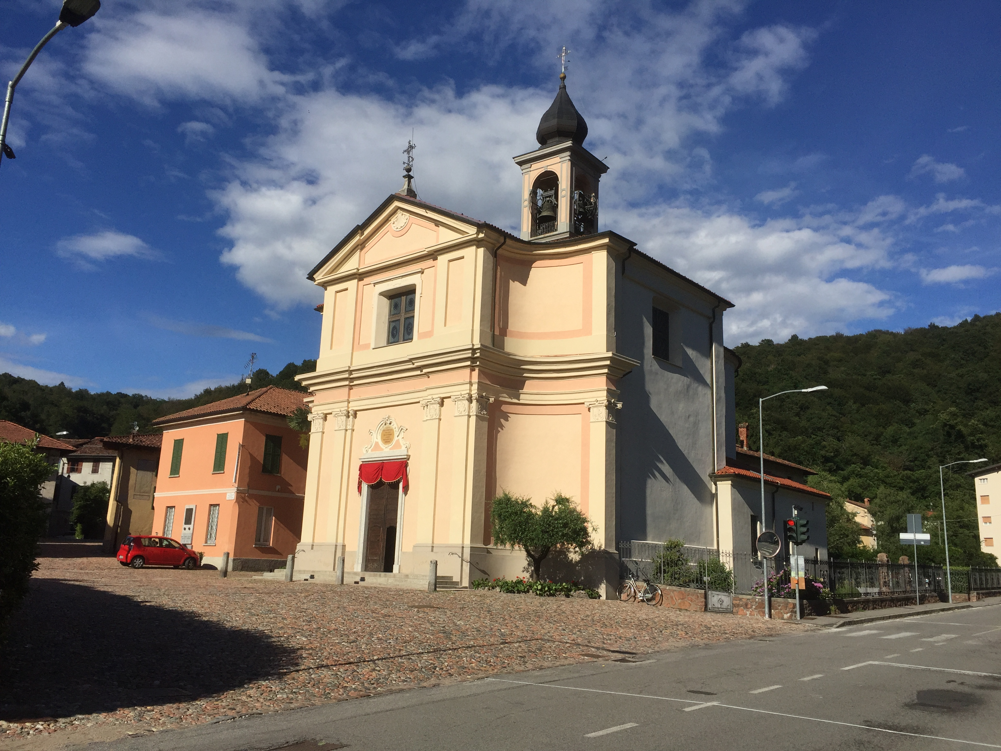 Vista frontale della chiesa parrocchiale del comune italiano di Brinzio (VA) dopo i restauri del biennio 2016-2017